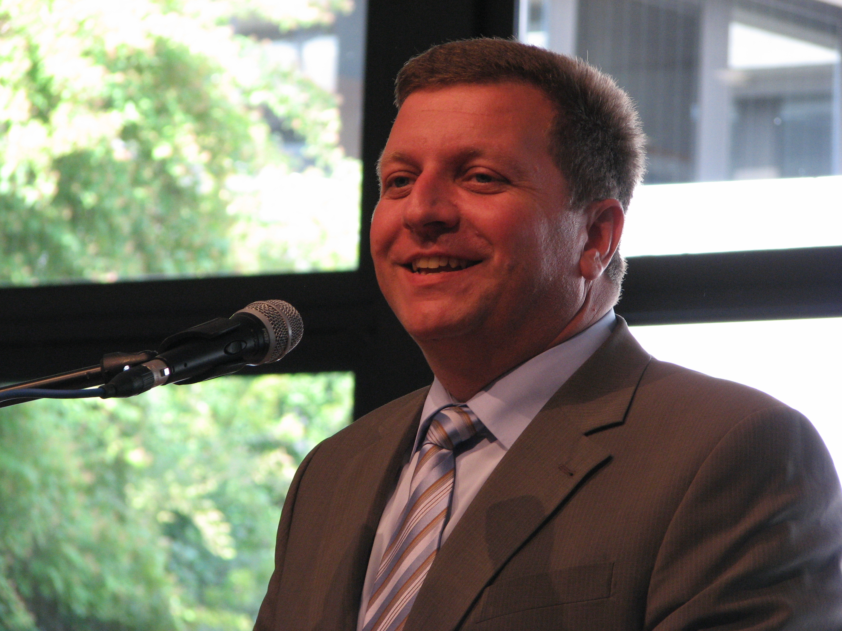 Christian Bernreiter bei einer Rede anlässlich einer Abiturabschlussfeier